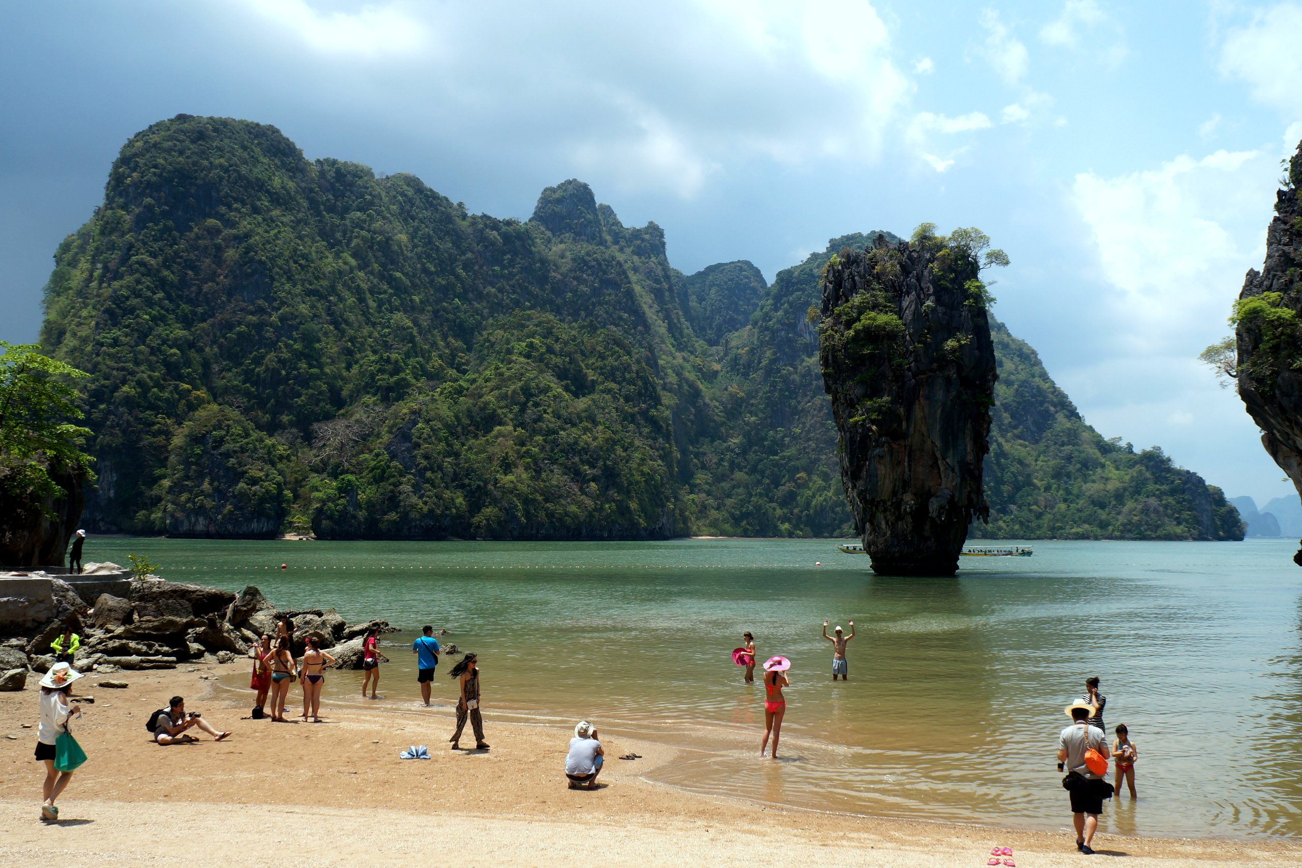 James Bond Felsen in der phang nga bay